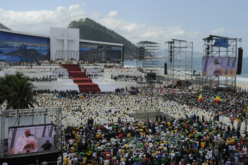 Missa de Envio, Jornada Mundial da Juventude, Rio de Janeiro, Brasil 2013. Um público que deve chegar a 3 milhões de pessoas, de acordo com a prefeitura do Rio, assiste o papa Francisco celebrar a Santa Missa pela 28ª Jornada Mundial da Juventude (JMJ), na praia de Copacabana